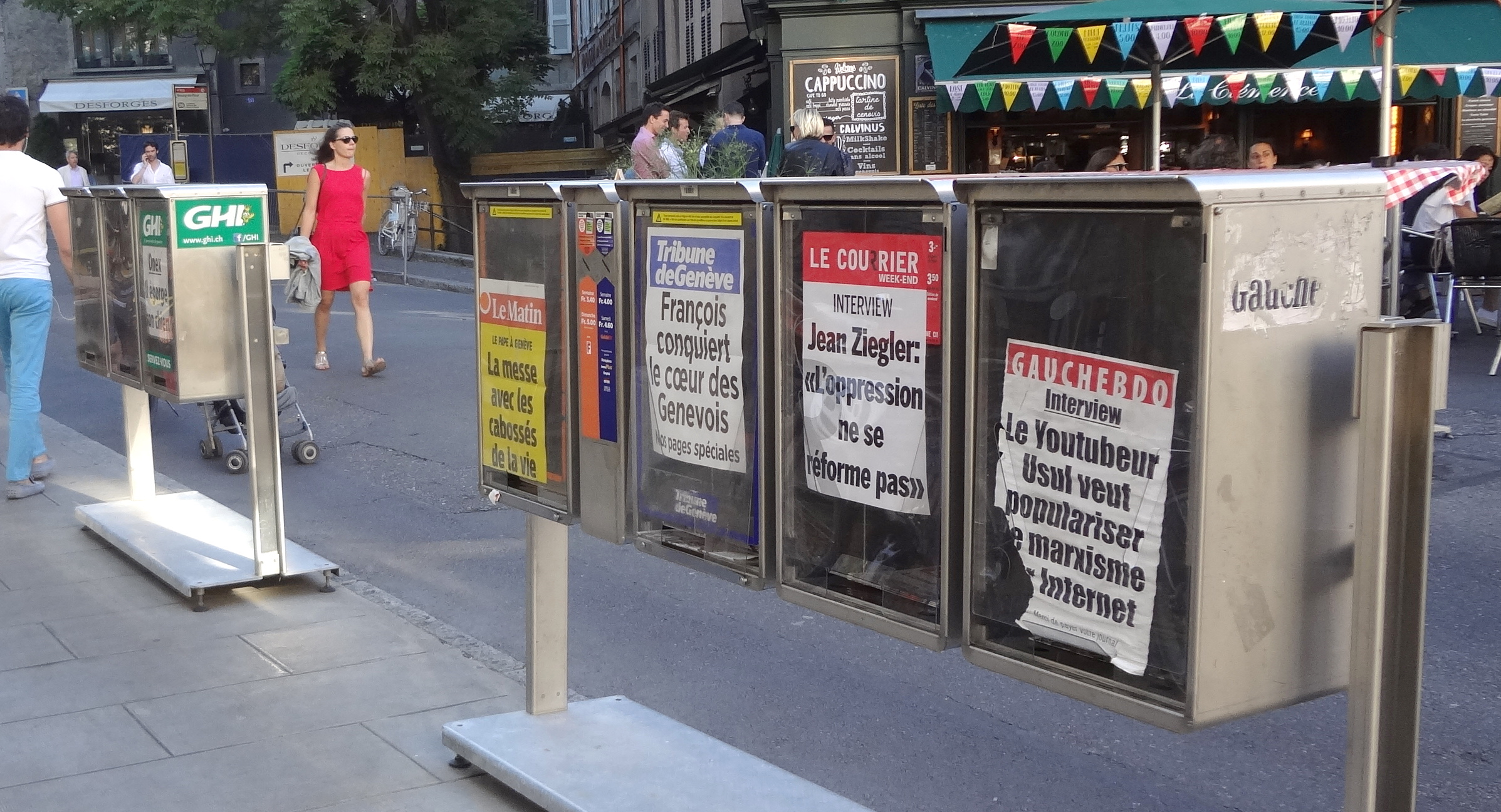 Deux groupes de trois et quatre cassettes pour les journaux en vente ou gratuits, au Bourg-de-Four, Genève. Gauche-Hebdo, Le Courrier, Tribune de Genève, Le Matin, Genève Home Informations (GHI) et 20 Minutes.